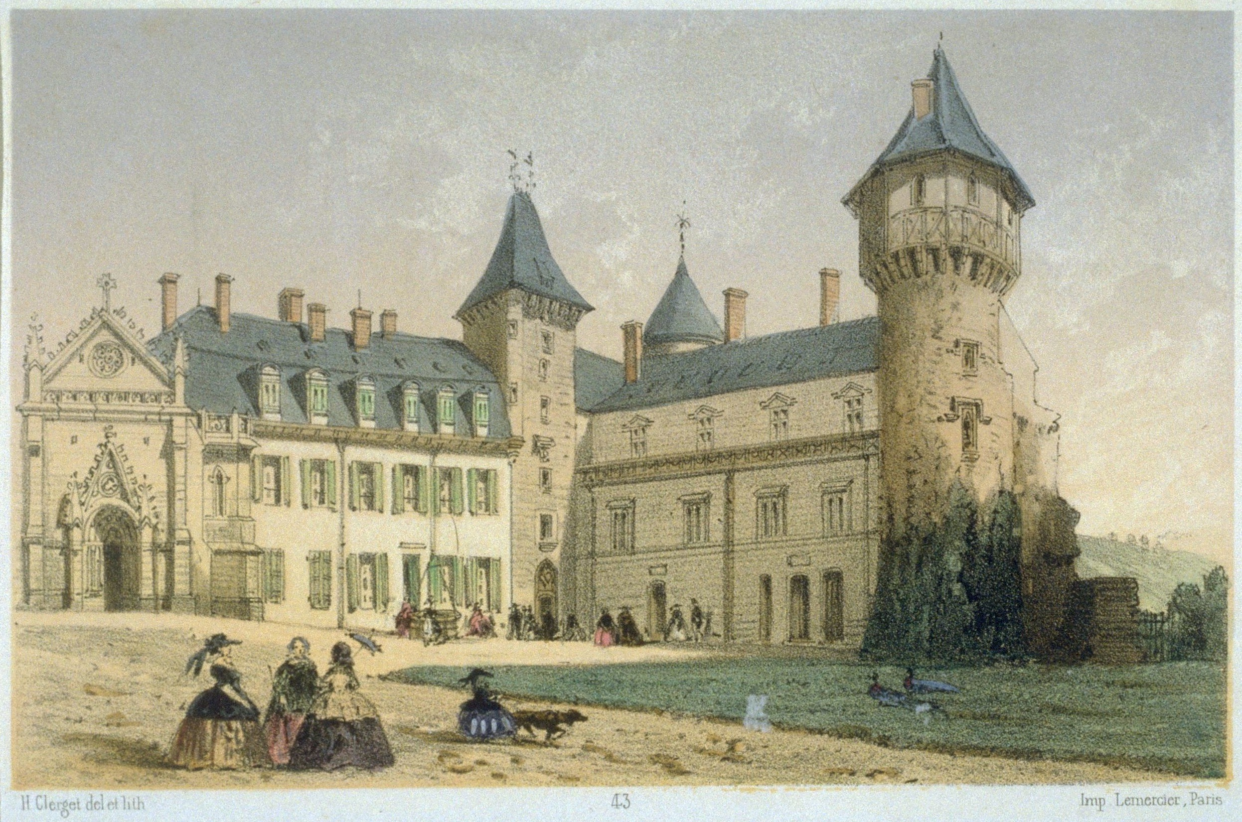 Kolorierte Lithografie des Schlosses Busset